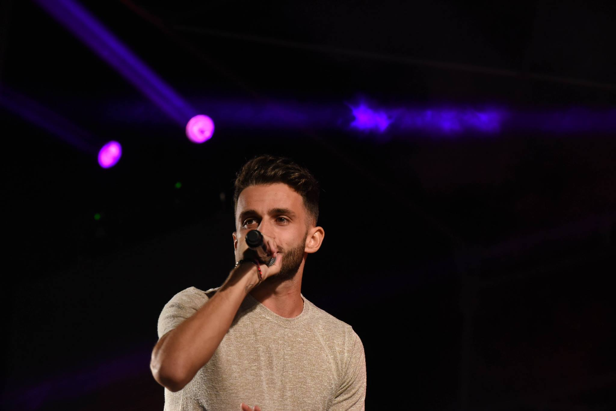 Ridsa Vesoul 2 septembre 2016